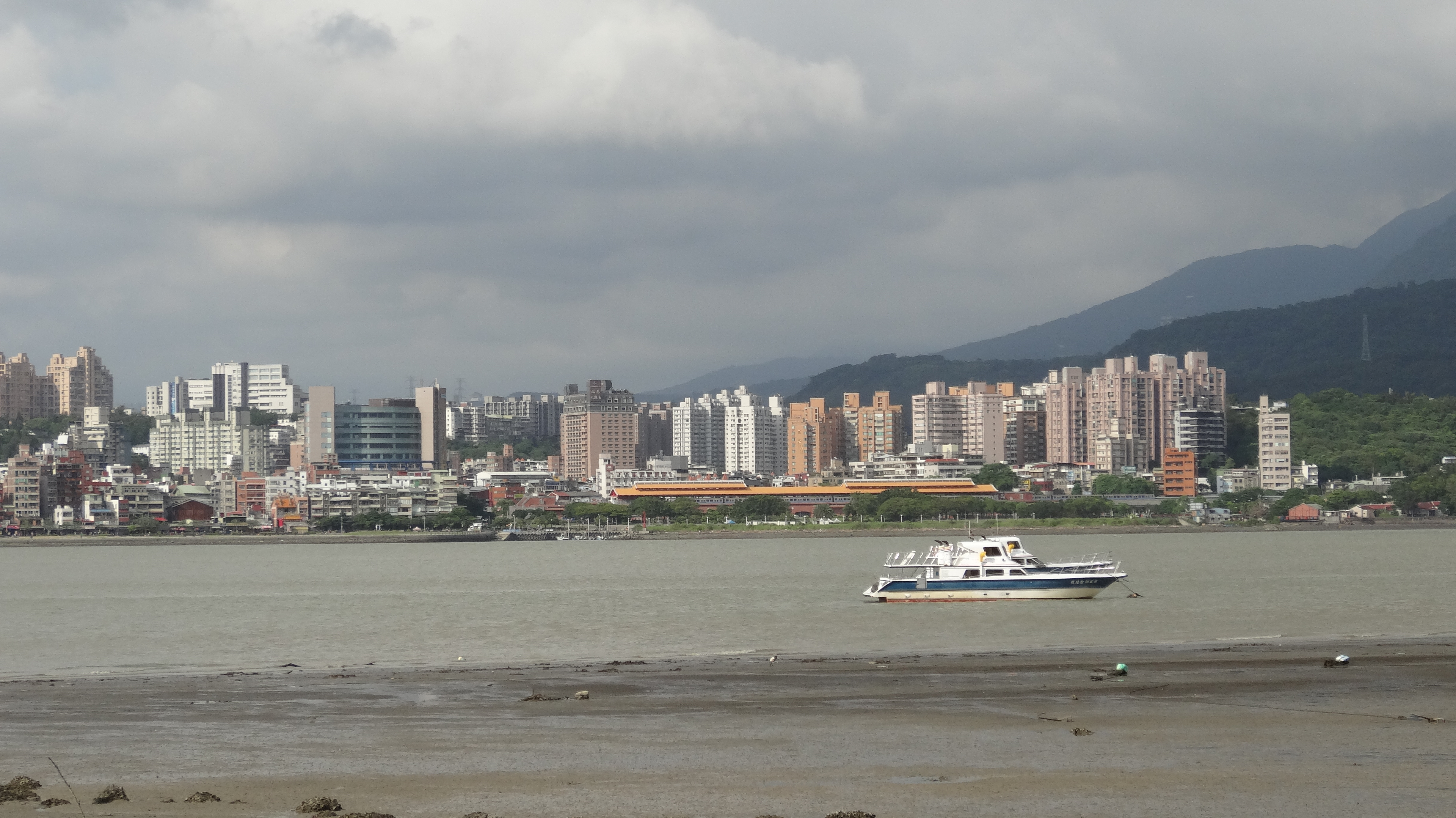 從八里左岸自行車道眺望捷運淡水站。